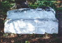 Stećak, Mramorje, Bulatovci